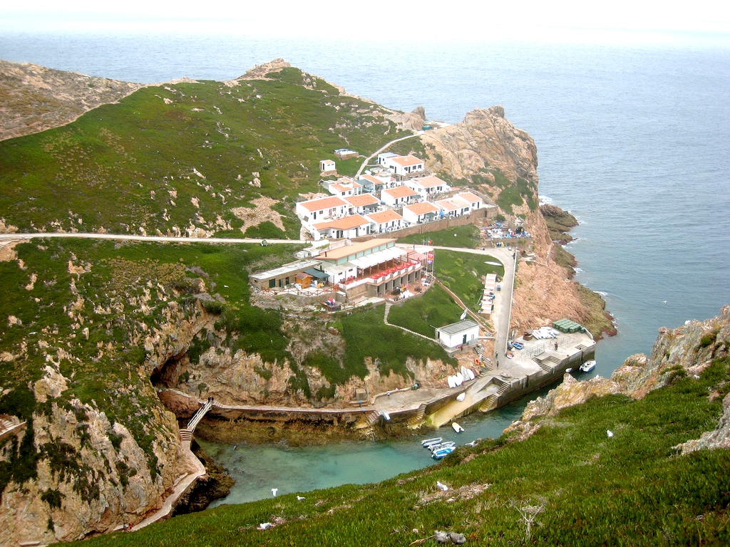 Ilha de Berlenga Grande, Bairro dos pescadores. En vert foncé, une espèce introduite et invasive, le Mesembryanthemum cristalinum (en portugais : chorão), couvre de très grandes surfaces.